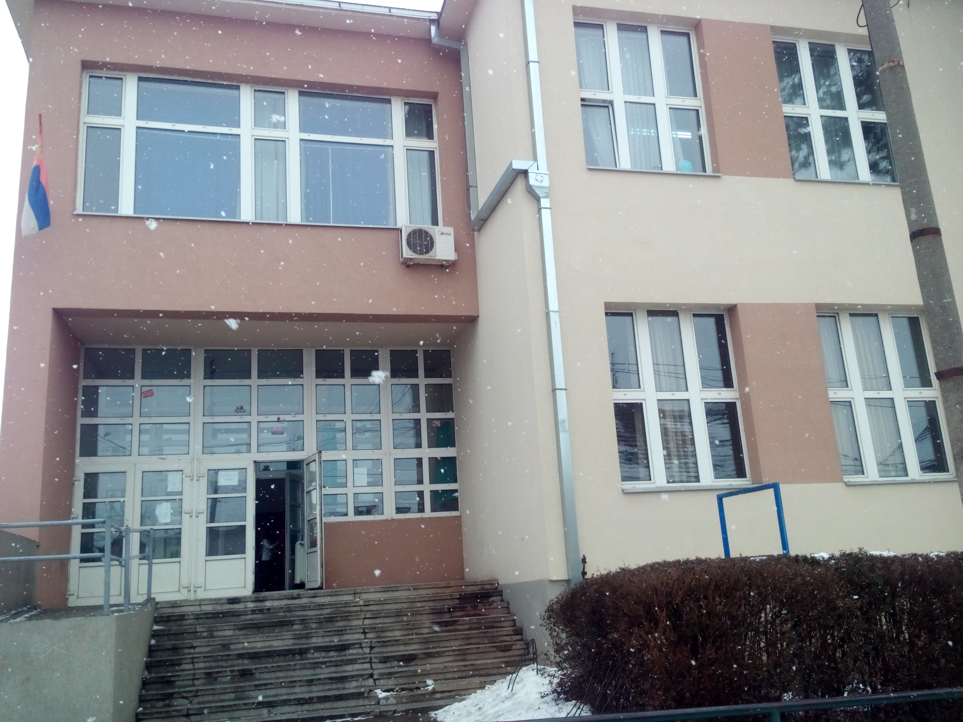 Srpski (latinica): Fotografija škole